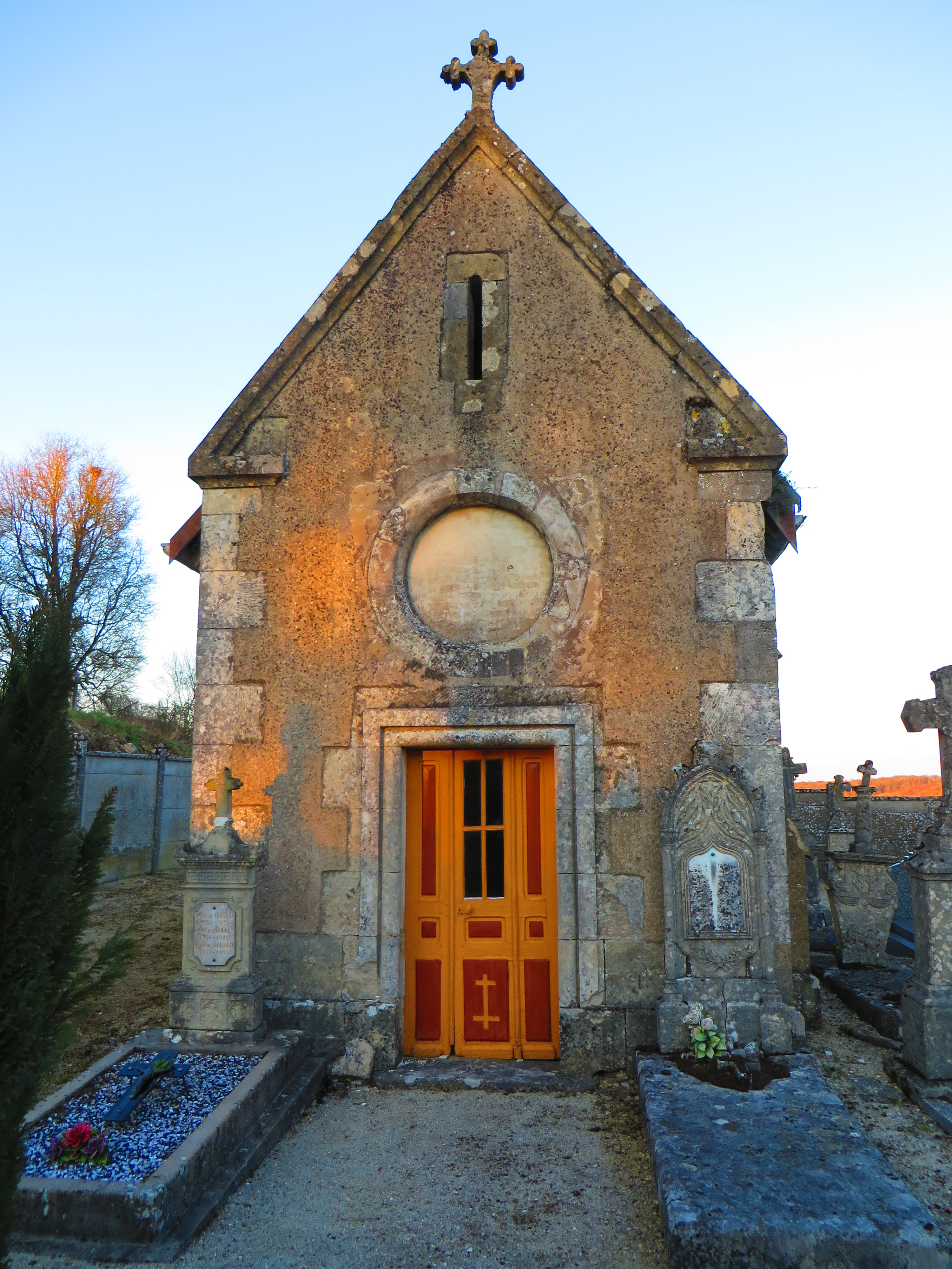 Amanty chapelle Sainte-Anne